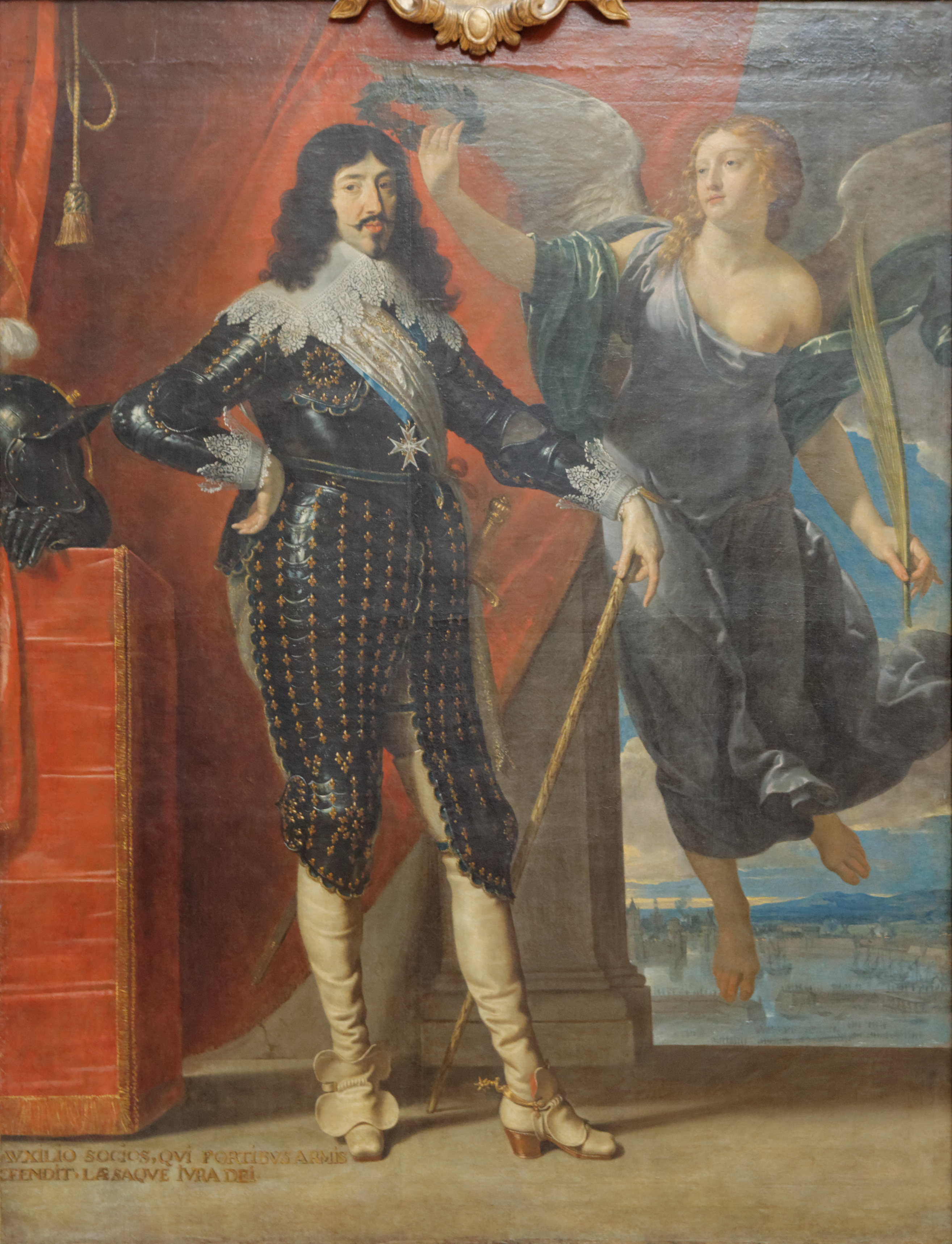 coupé au bord du cadre